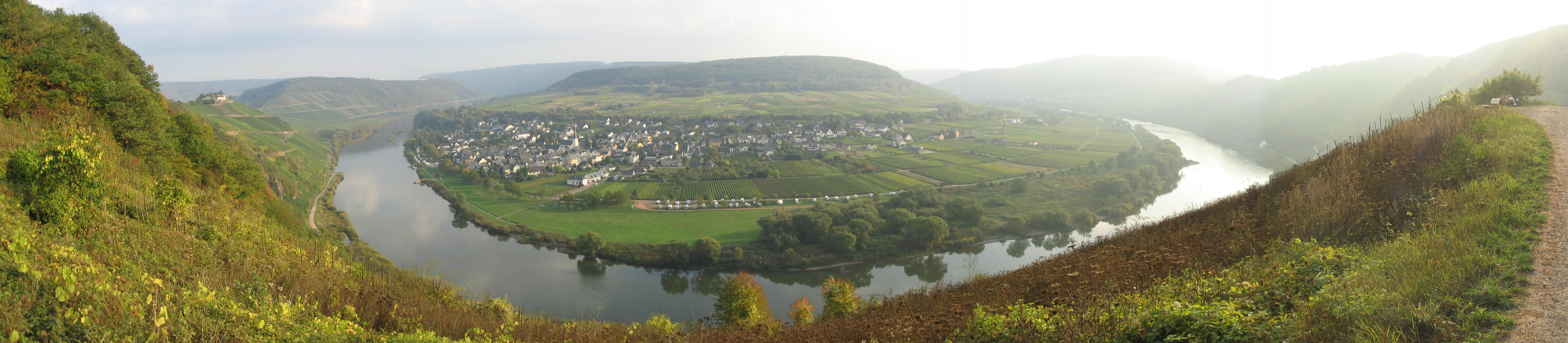 Pünderich an der Mosel